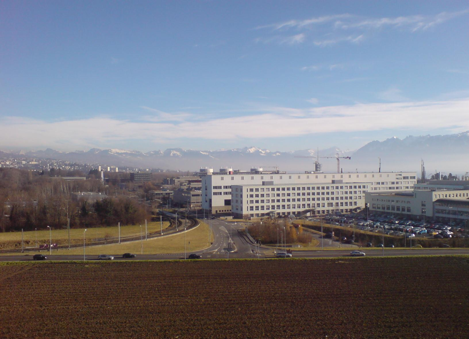 L'EPFL vu depuis l'esplanade Bonaparte.